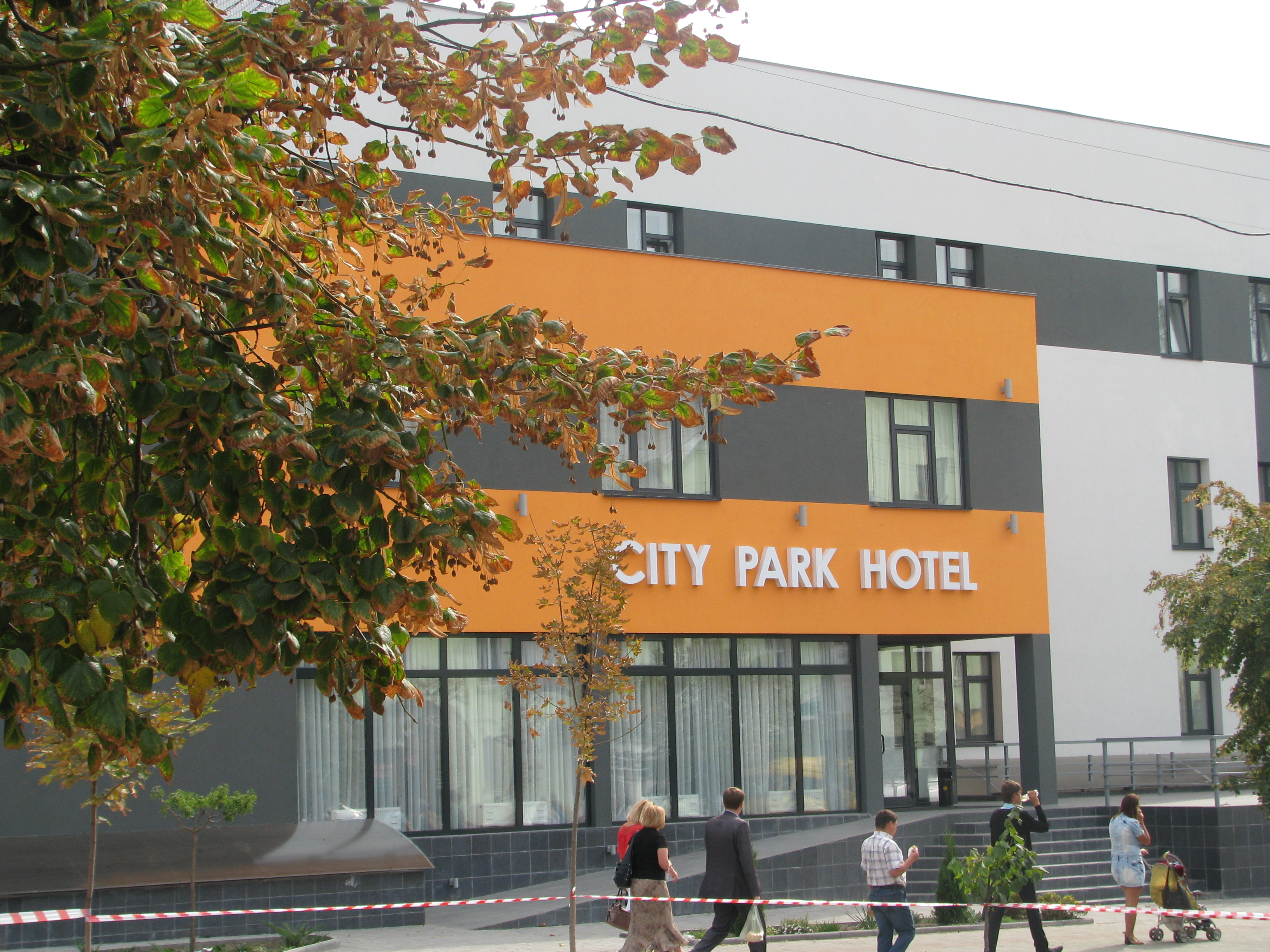 Готель «City Park Hotel» (м. Біла Церква)